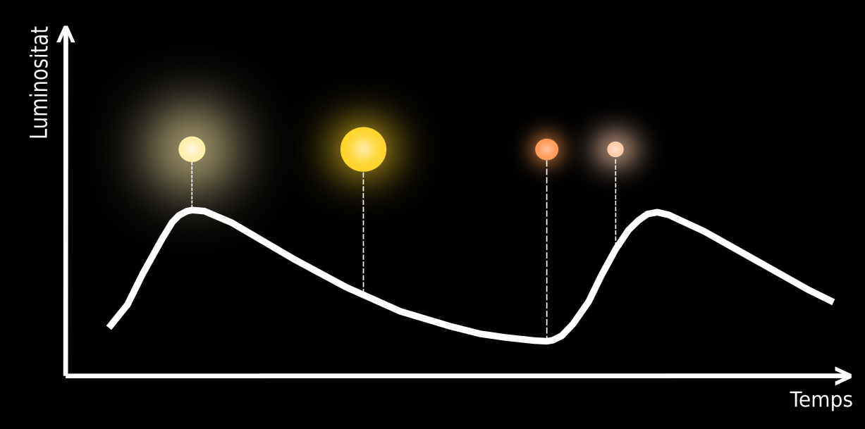 Variacion de luminositat d'una cefeida en foncion dau temps.